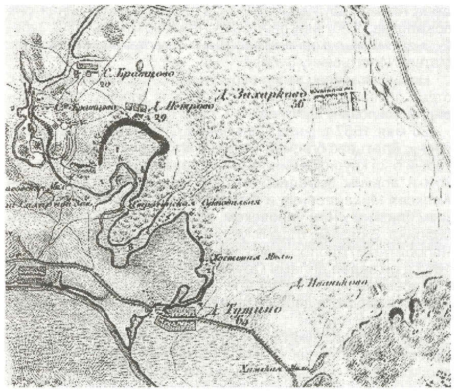 Тушино и окрестности. Фрагмент топографической карты Москвы 1818 г.